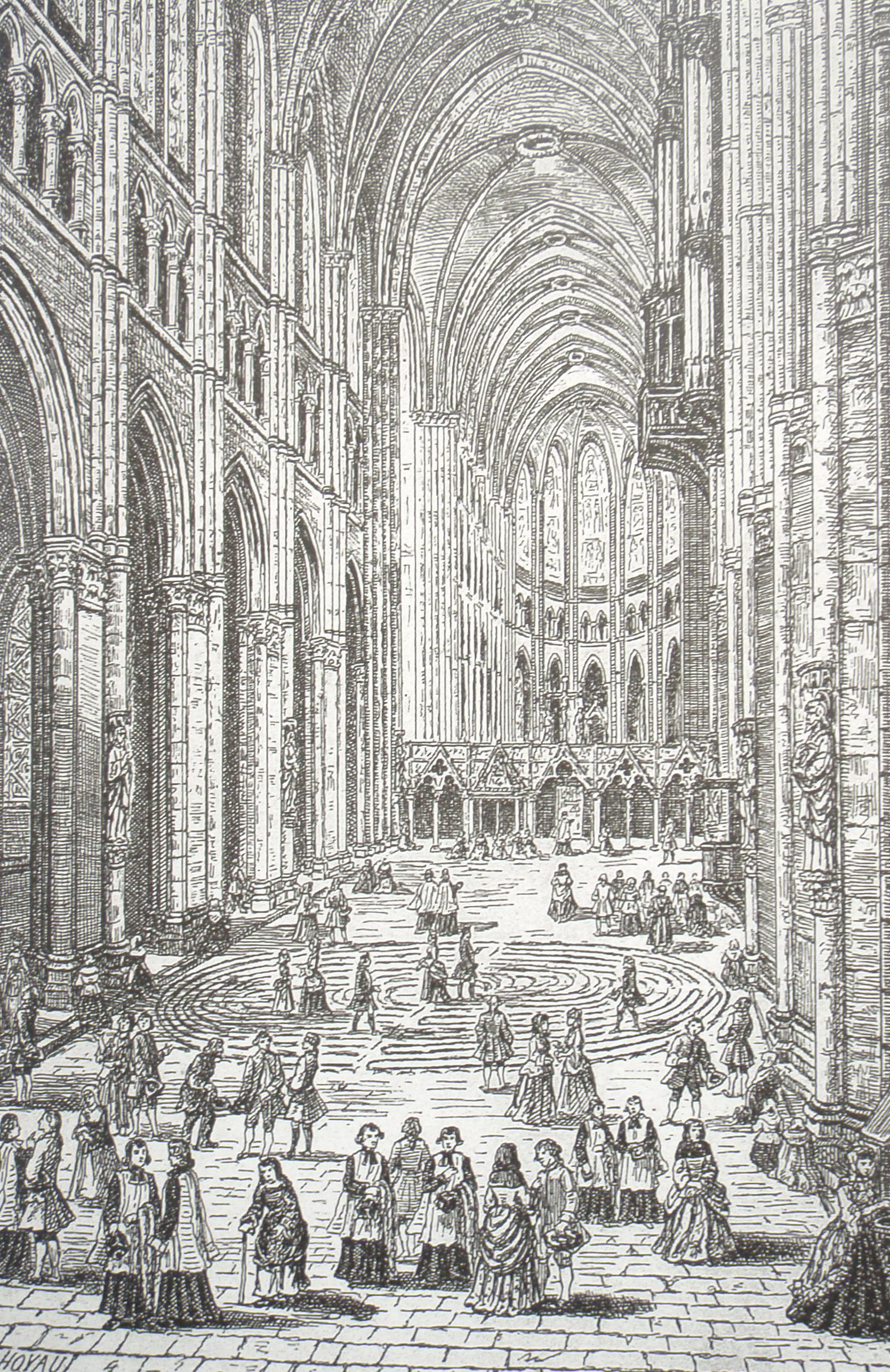 Inneres der Kathedrale um 1750 J.B. Rigaud